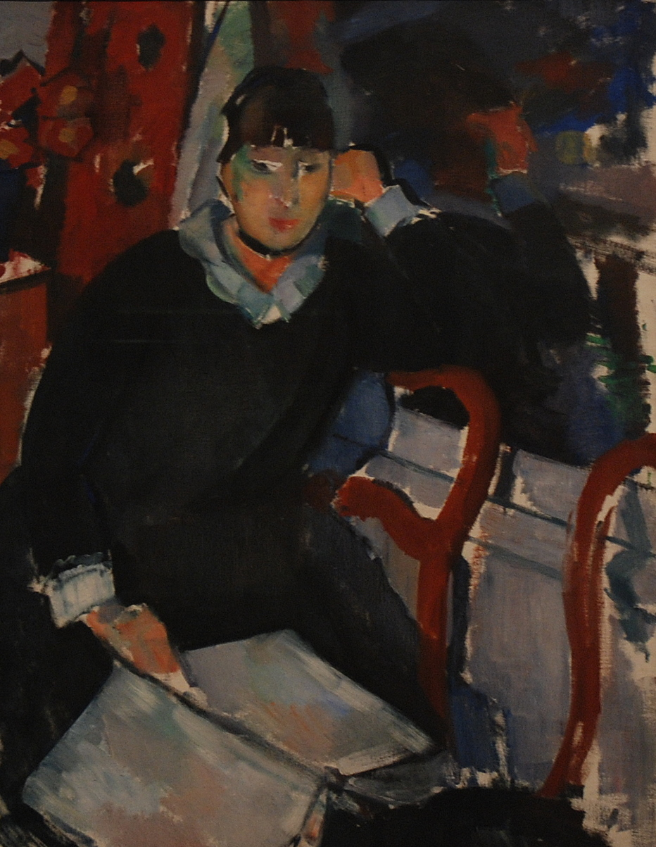 Museum voor Schone Kunsten te Gent (België) - Rik Wouters - Zittende vrouw bij het venster of Portret van Nel Deurinckx, vrouw van de kunstenaar Wikidata has entry Q15884224 with data related to this item.